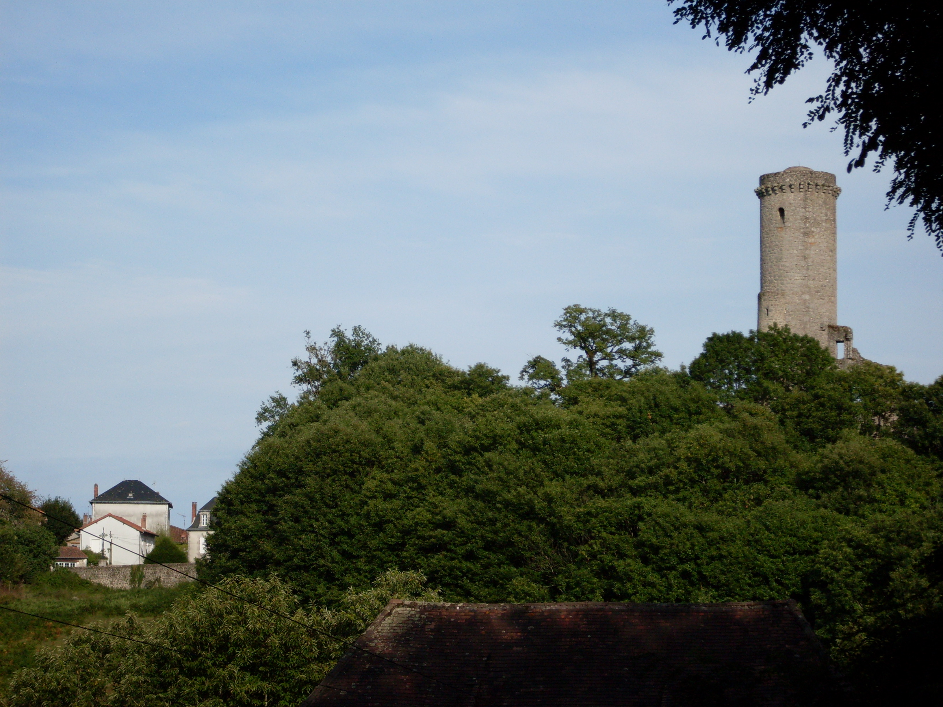 La tour de Piégut, commune de Piégut-Pluviers. Un vestige du château militaire du XIIe siècle.